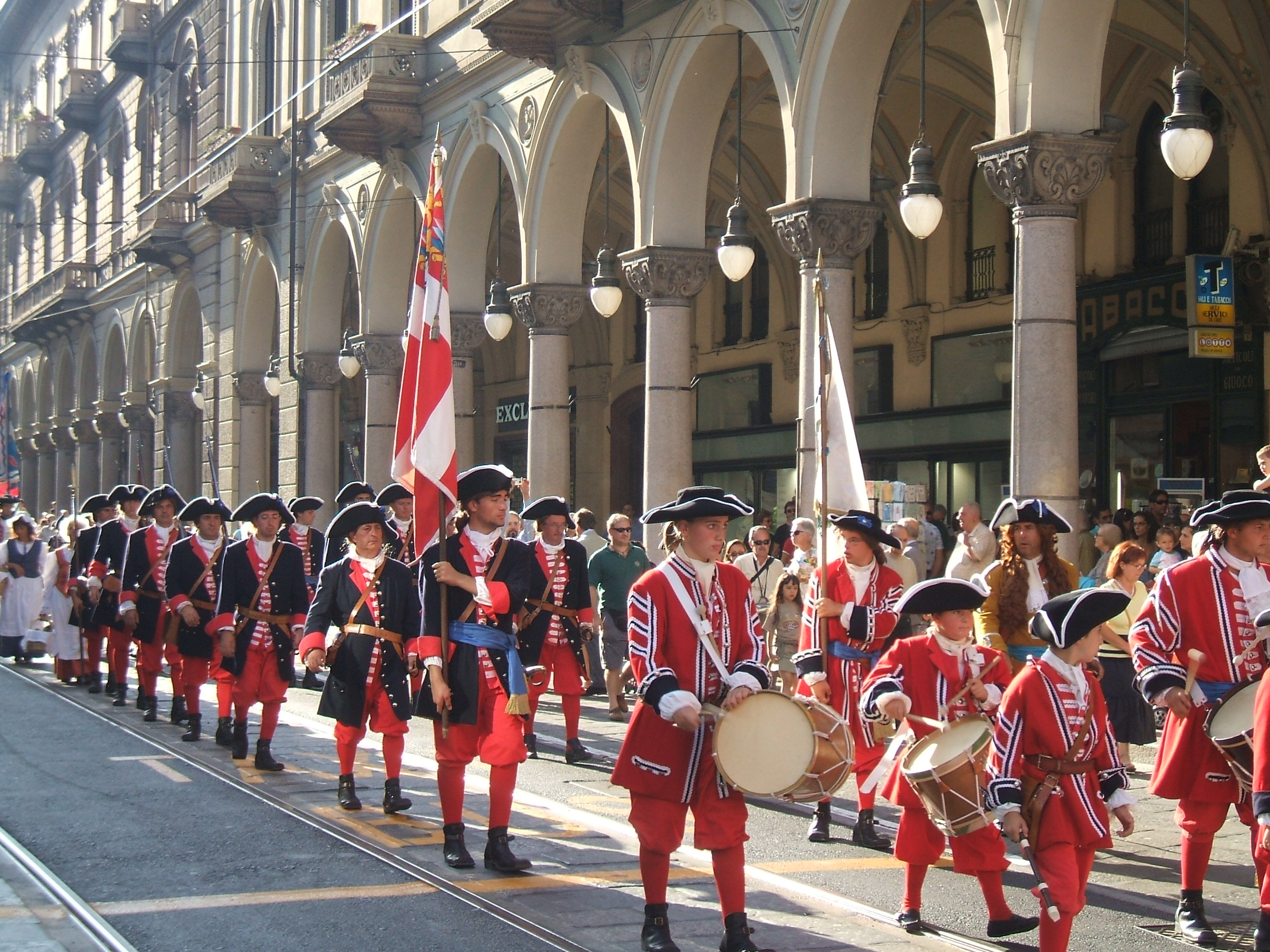 Rievocazione storica dell'Assedio di Torino del 1706, particolare della parata militare in Via Pietro Micca, a Torino: esercito piemontese